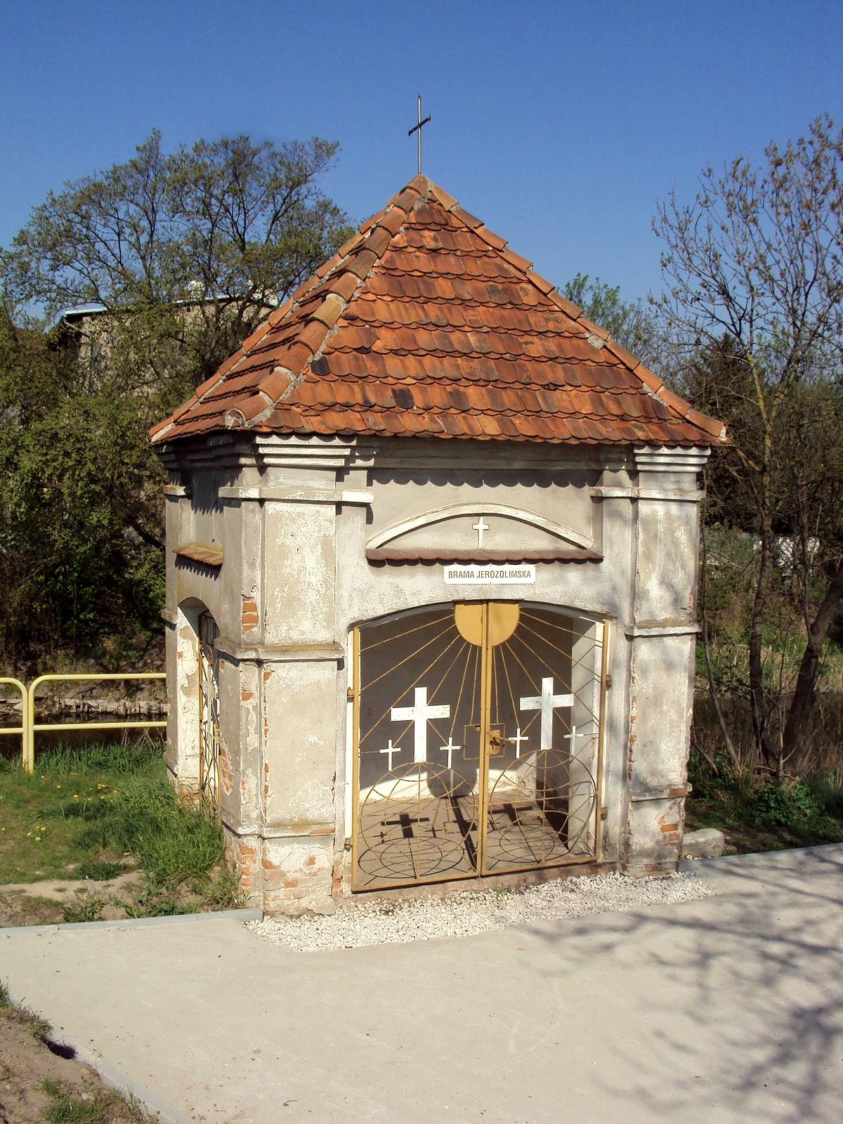 kapliczka Brama Jerozolimska